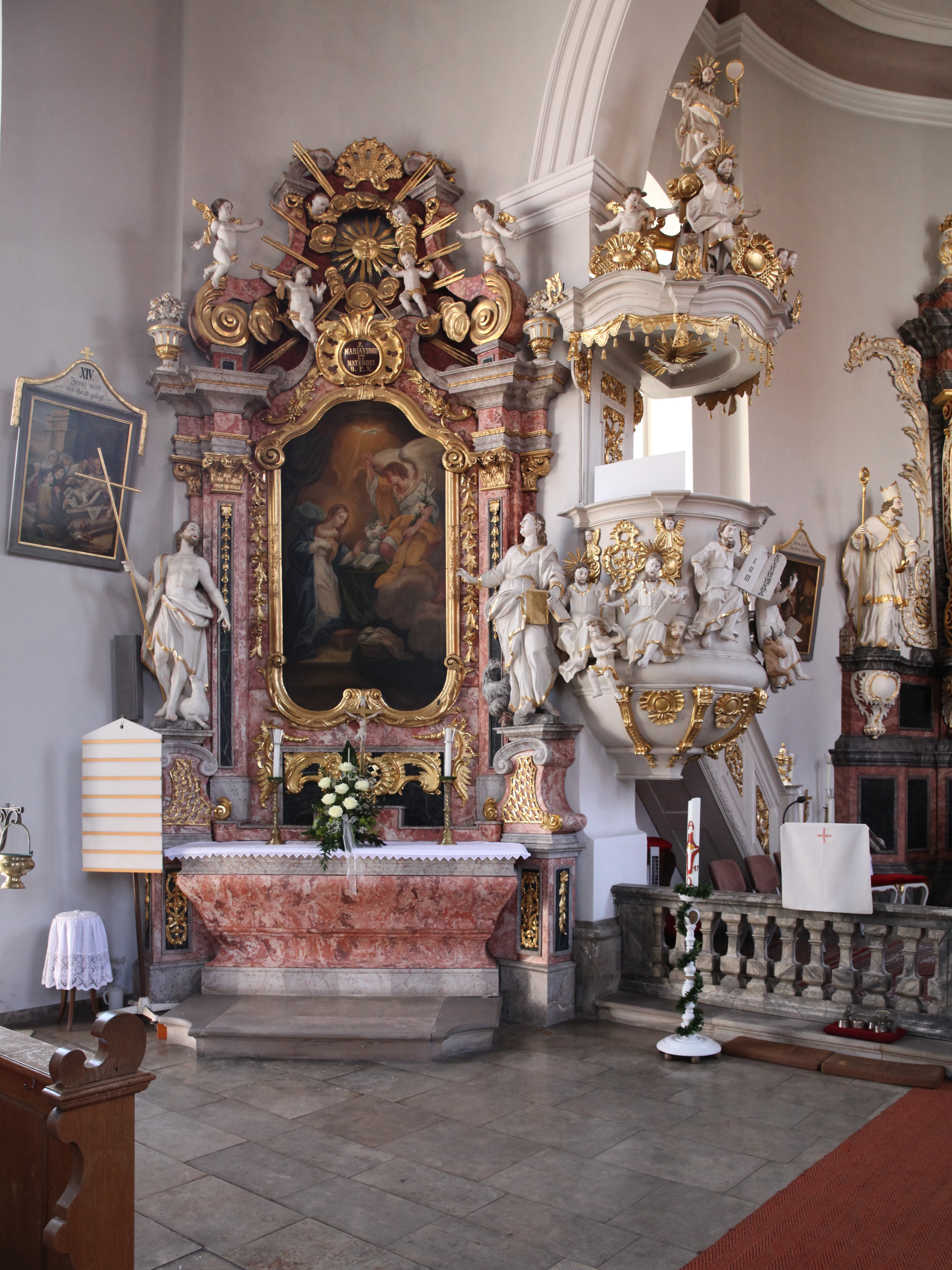 Katholische Pfarrkirche St. Wolfgang in Kaltenbrunn, Gemeinde Itzgrund: Kanzel